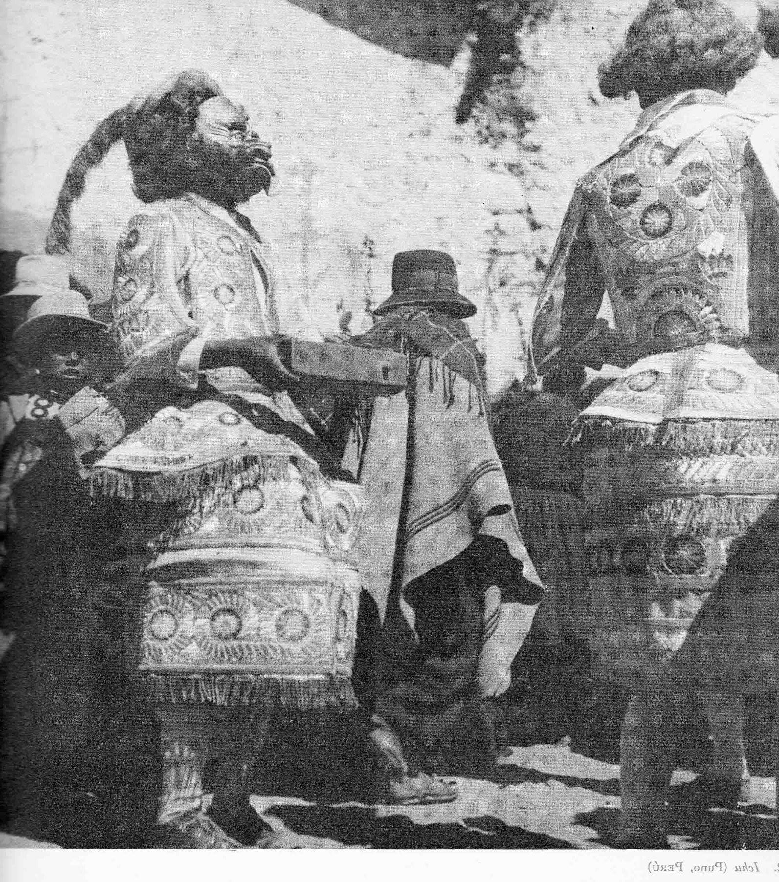 Pierre Verger de nacionalidad francesa recorre Puno donde incluye numerosas expresiones del altiplano peruano, a donde llegó en el año 1939. "Fiestas y danzas en el cuzco y los andes". Pierre Verger. Editorial Sudamericana, Buenos Aires 1945. Recuperado por Carlos Portugal Mendoza 2018